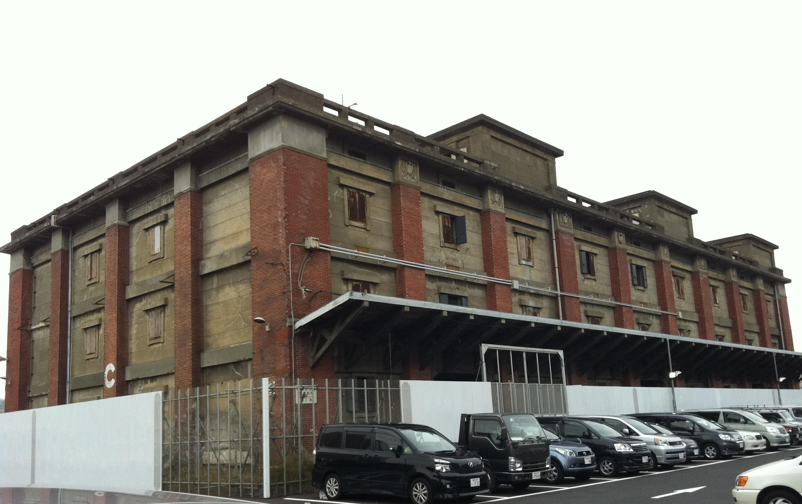 歴史的建造物の帝蚕倉庫（2011年12月）。旧横浜生糸検査所付属生糸絹物専用倉庫として大正15年（1926年）建築。